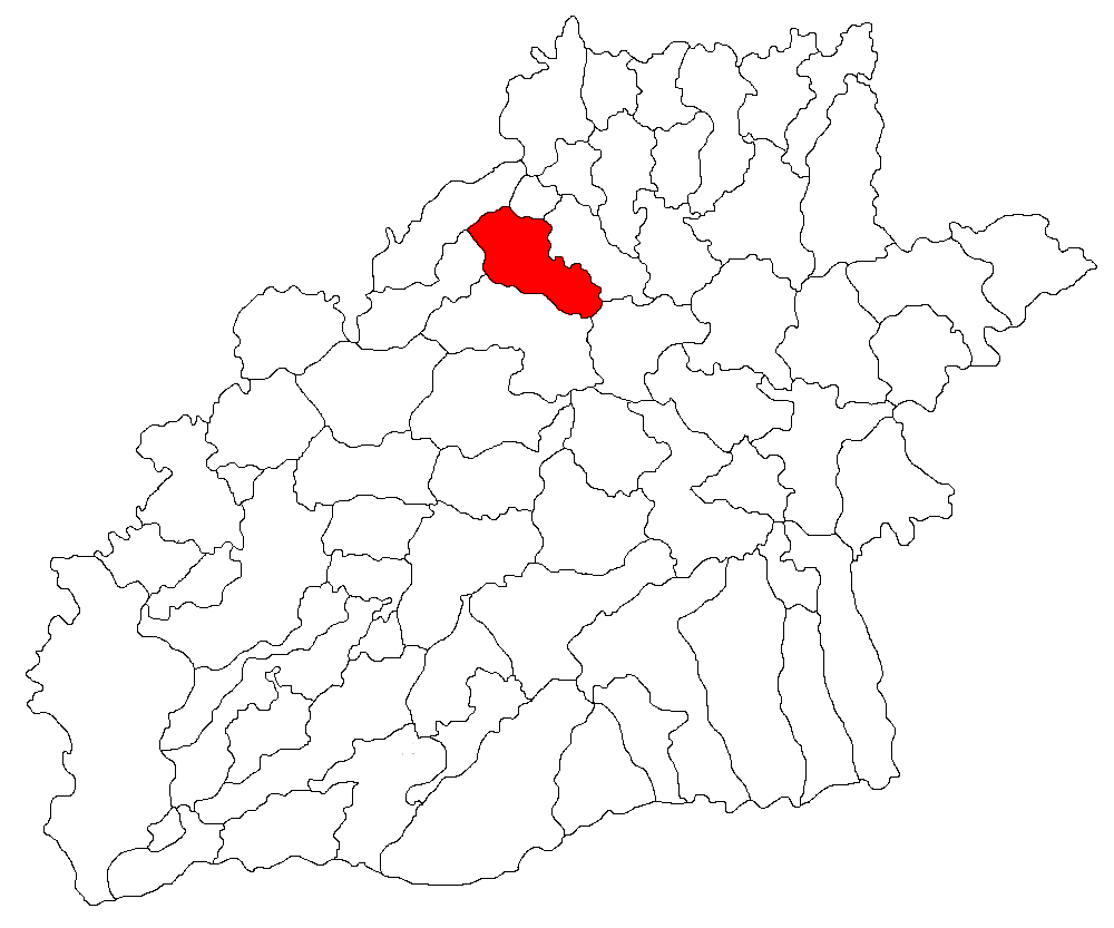 Categorie:Hărţi ale judeţului Sibiu